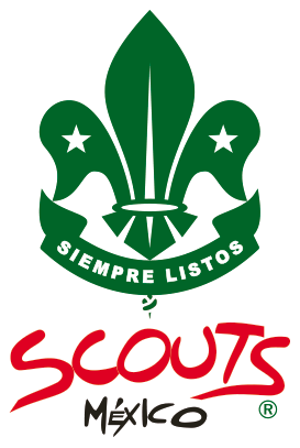 Emblema oficial de la Asociación de Scouts de México, A.C.